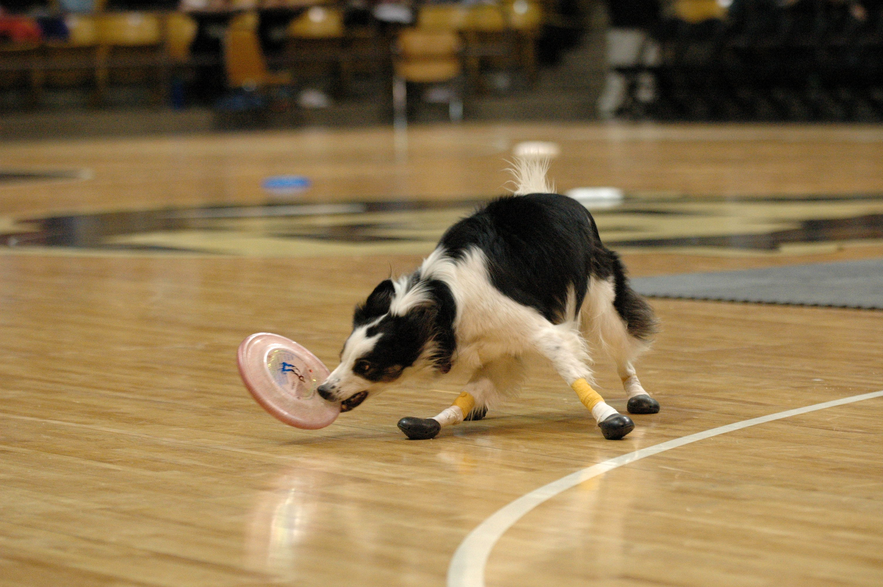 Disk dogging